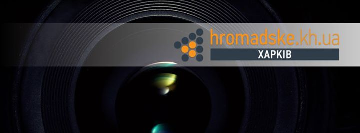 Варіант логотипу Громадського Харків